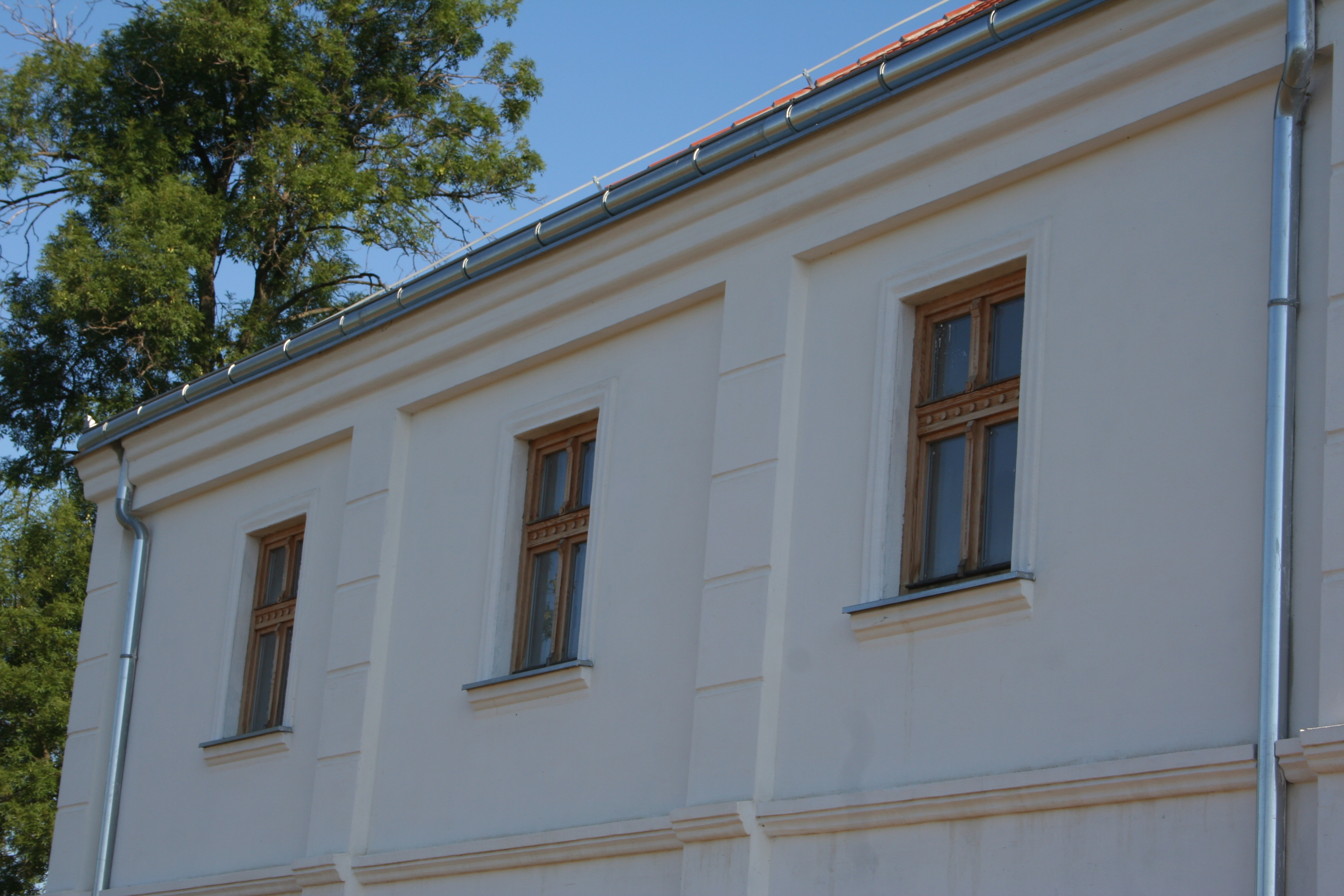 Konaci Radića i Brene Mihajlović (preseljeni iz Malog Borka u Lajkovac)